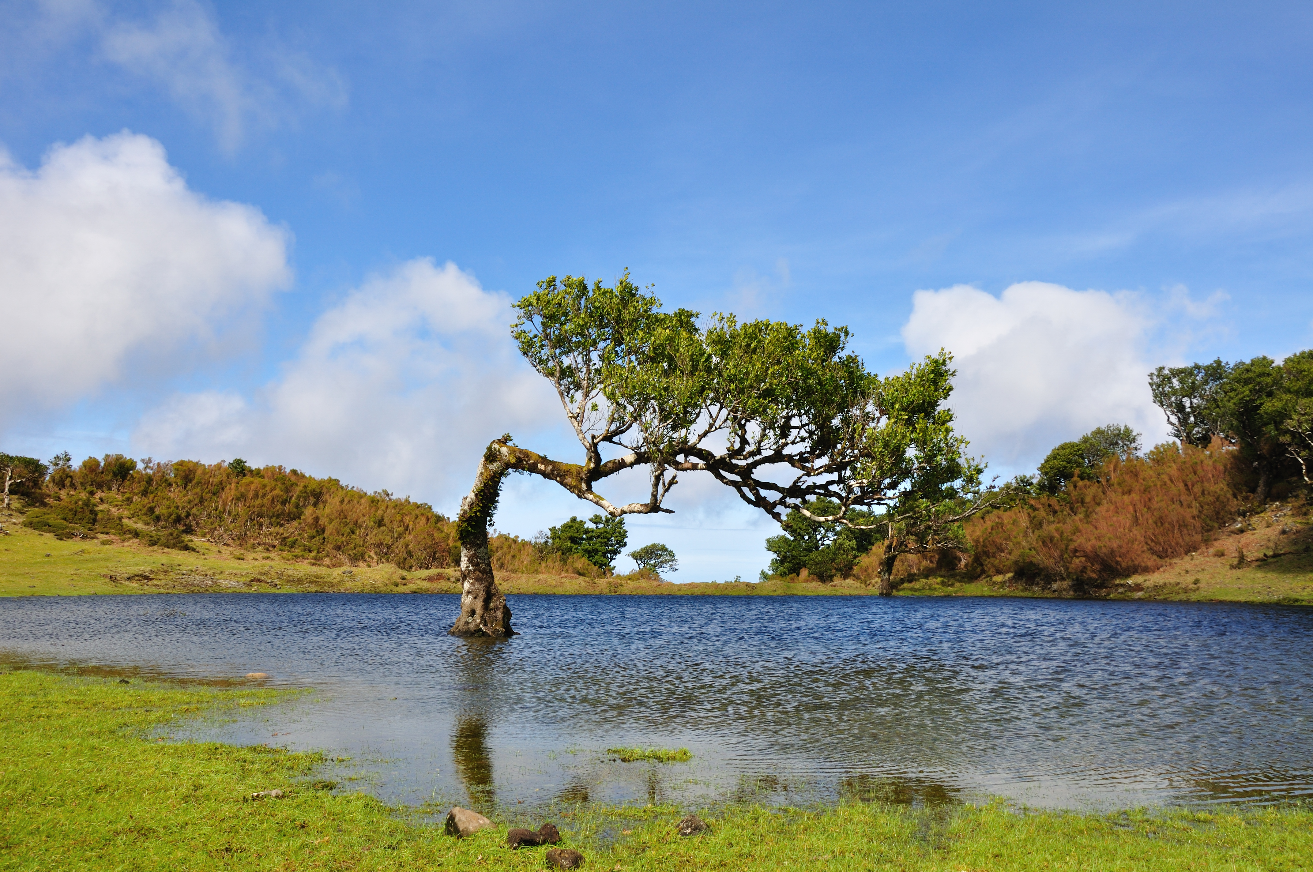 Portugal, Fanal